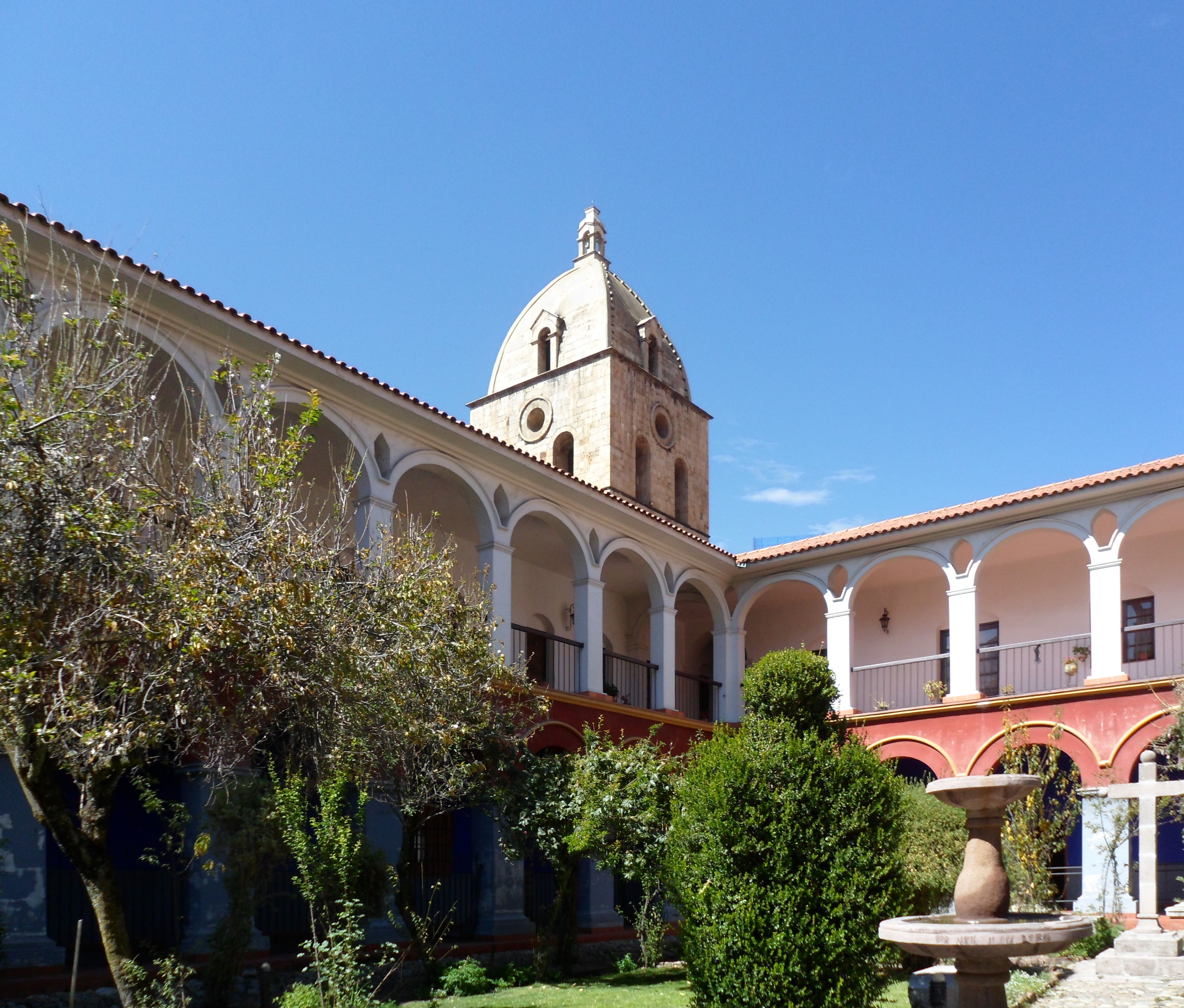 Claustro Mayor, Huerta, Convento de San Francisco. La Paz, Bolivia